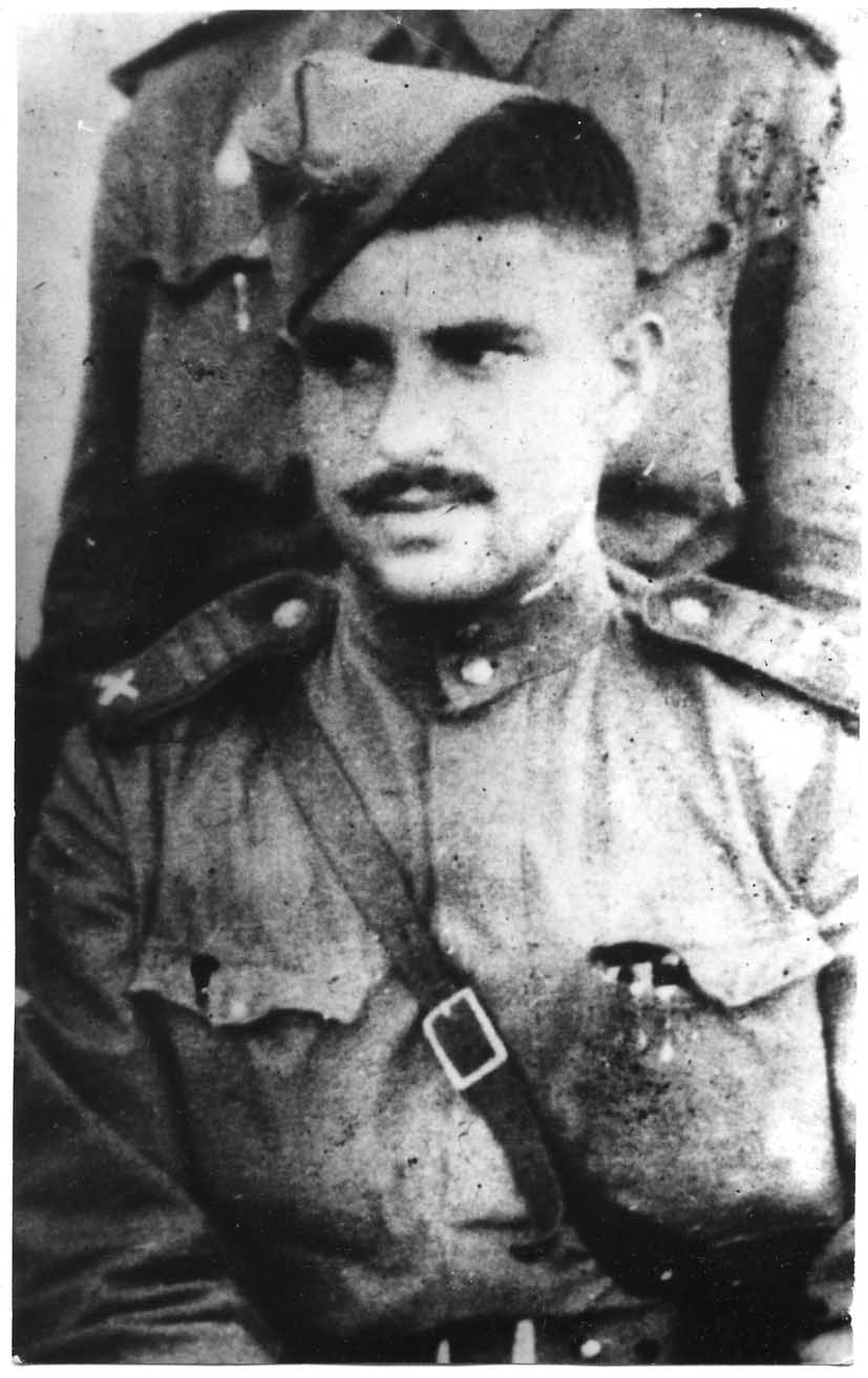 Наум Гребнев в 1941-1943 годах